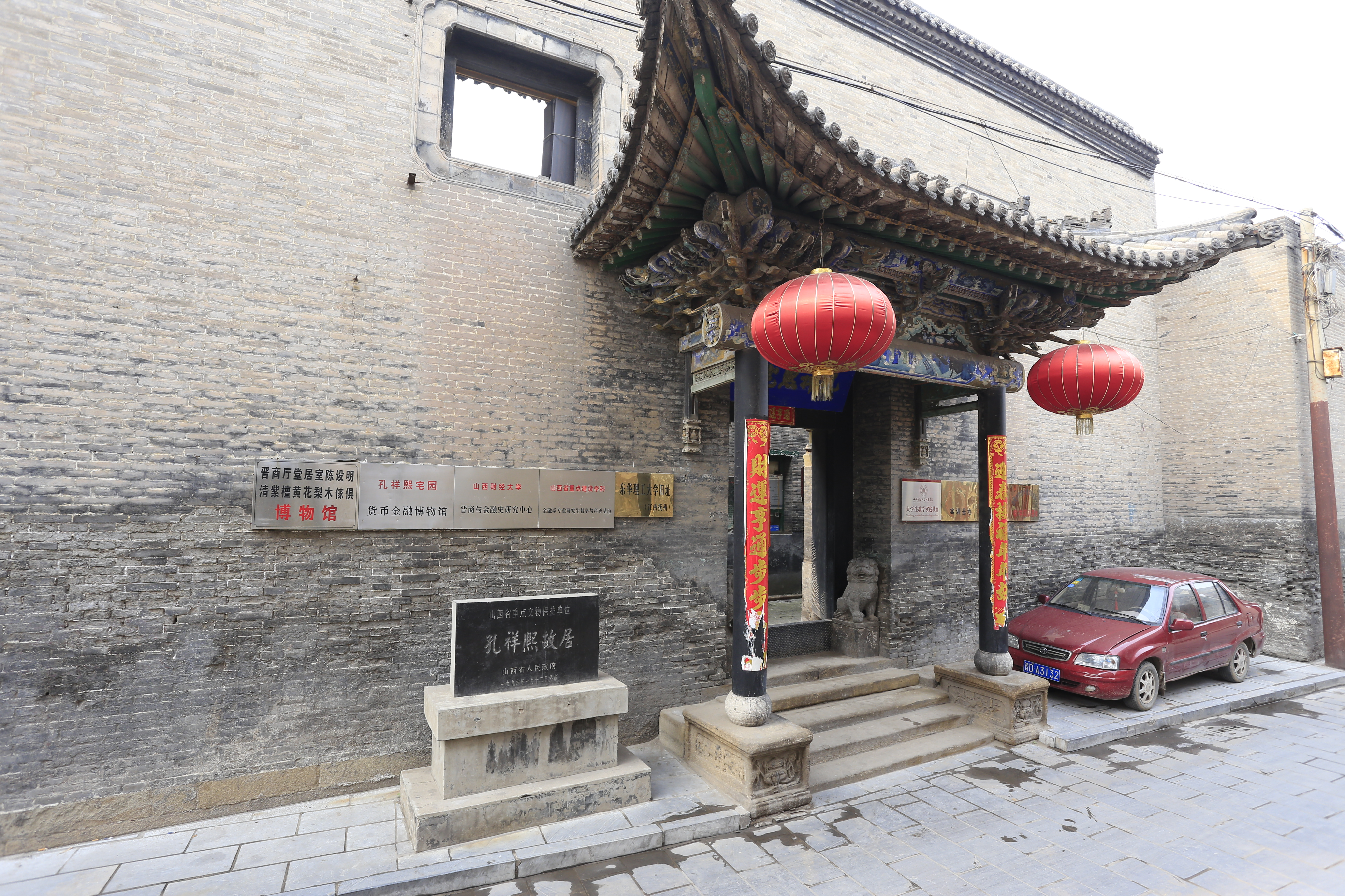 太谷孔祥熙旧居（孔家大院） —— 大门